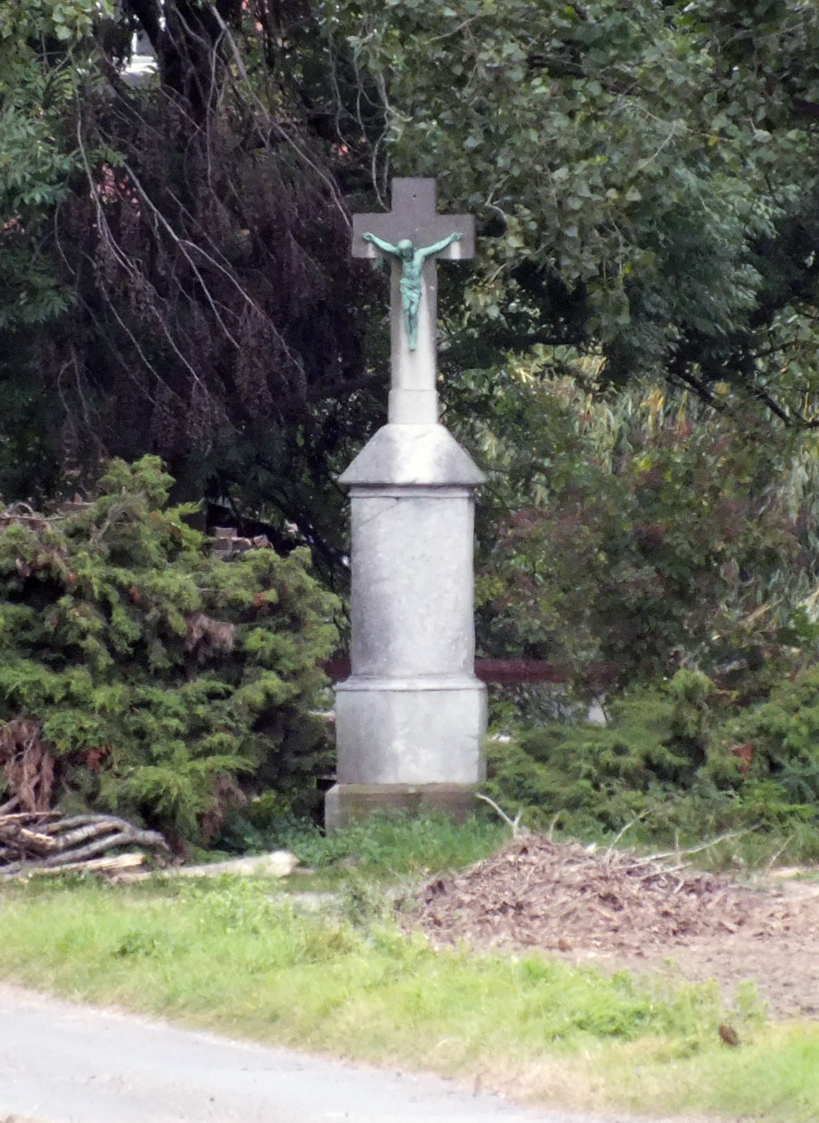 Niederaußem, Wegekreuz Gut Asperschlag, Denkmal 227; nur über Privatstraße erreichbar This is a photograph of an architectural monument.